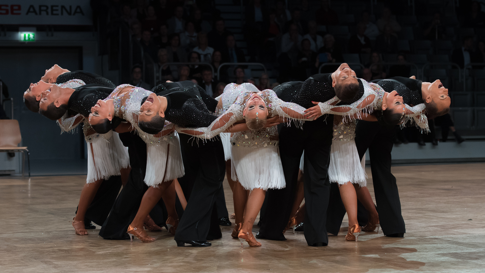 Brose Arena Bamberg,Deutsche Meisterschaften der Formationen Standard & Latein 2016,FG T.T.C Rot-Weiss-Silber Bochum/1. TSZ Velbert A,Herzschlag,Latein,Tanzsport